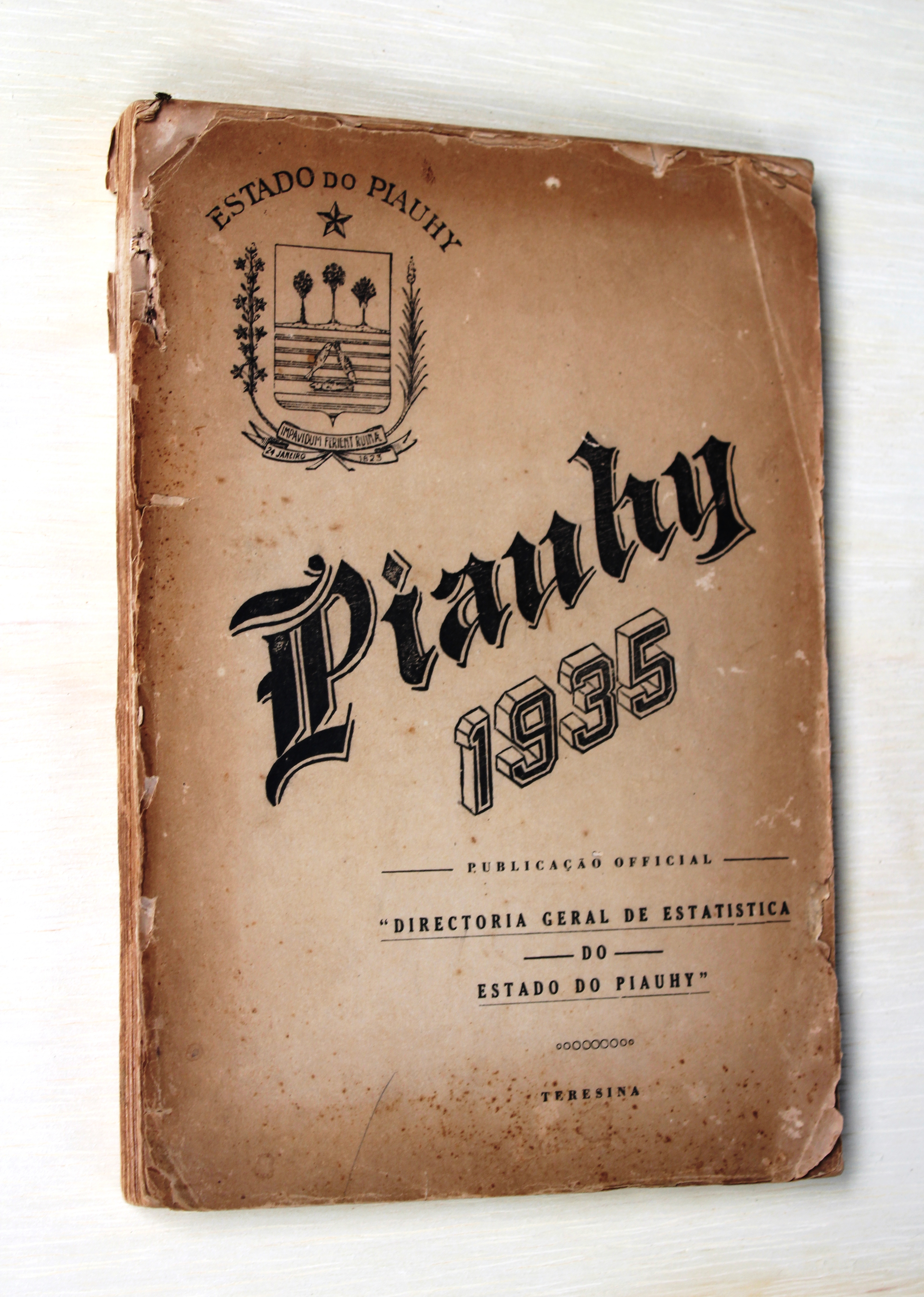 Anuário Piauí de 1935 uma publicação feita pelo Governo do Piauí naquele ano.